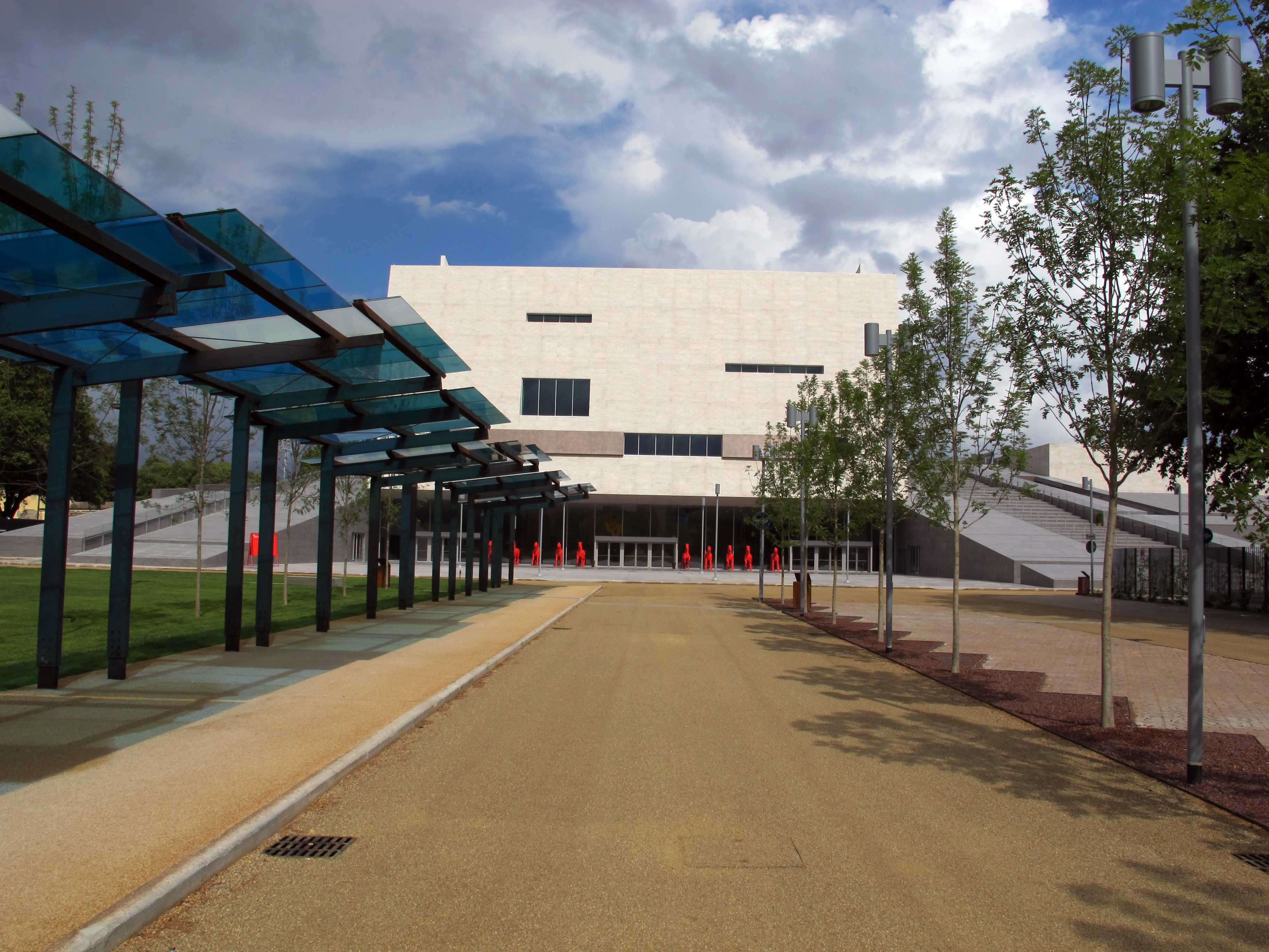 Firenze, miscellanea